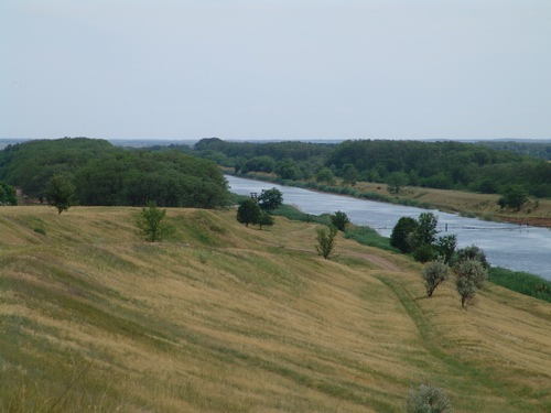 Martynovsky District, Rostov Oblast, Russia